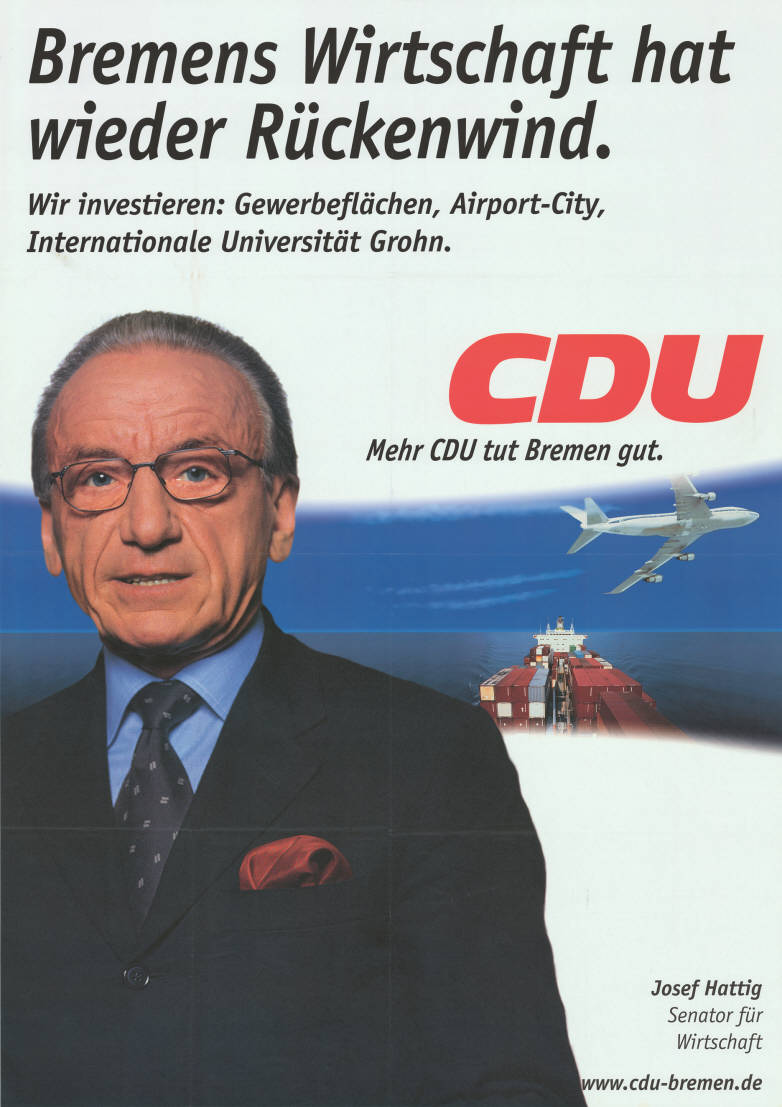 Bremens Wirtschaft hat wieder Rückenwind. Wir investieren: Gewerbeflächen, Airport-City, Internationale Universität Grohn. CDU Mehr CDU tut Bremen gut. Josef Hattig Senator für Wirtschaft Abbildung: Foto vor Containerschiff und Flugzeug Plakatart: Kandidaten-/Personenplakat mit Porträt Objekt-Signatur: 10-005 : 1005 Bestand: Plakate zu Bürgerschaftswahlen Bremen (10-005) GliederungBestand10-18: Plakate zu Bürgerschaftswahlen Bremen (10-005) » CDU Lizenz: KAS/ACDP 10-005 : 1005 CC-BY-SA 3.0 DE